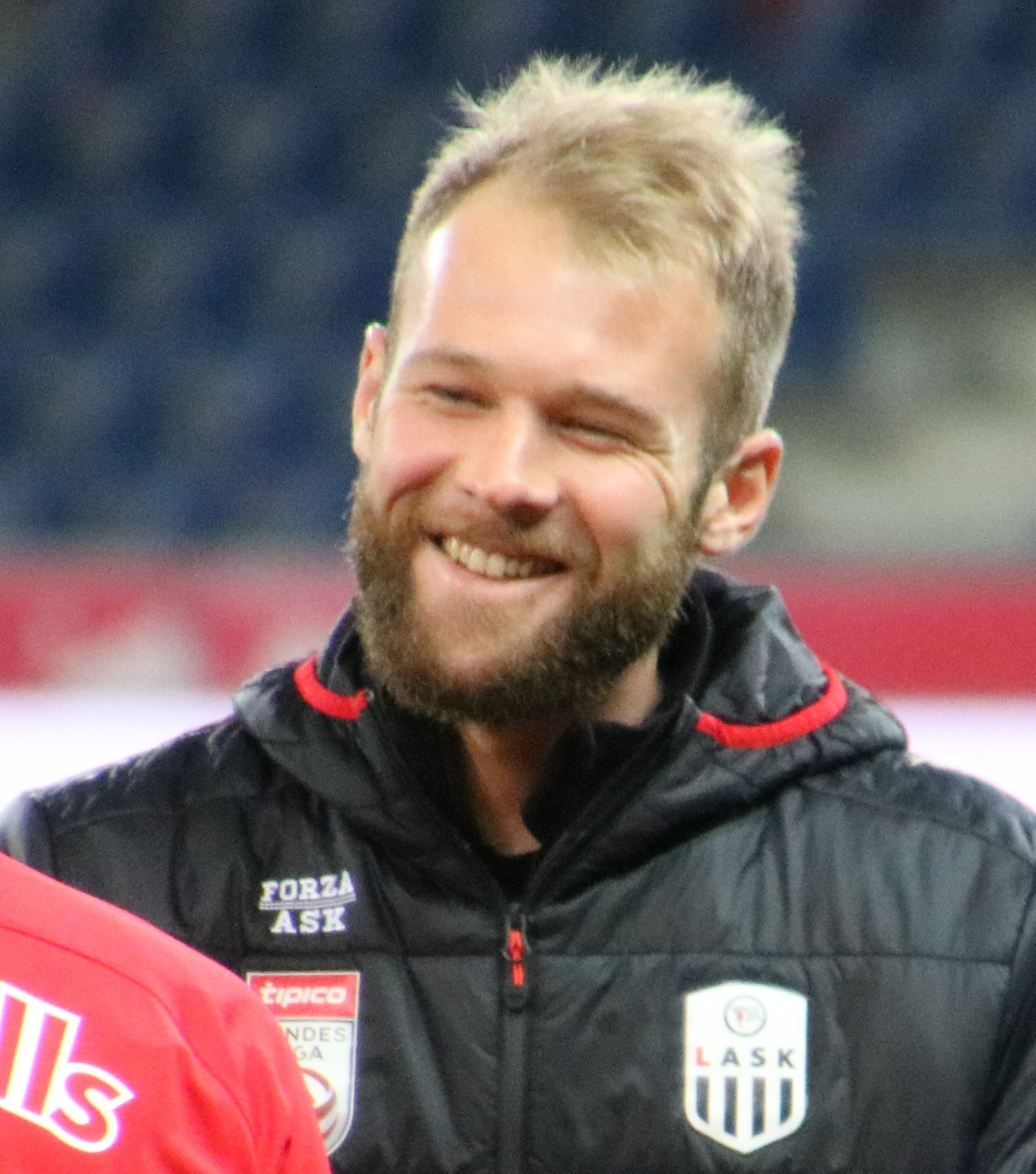 Österreichische Bundesliga 19. Runde